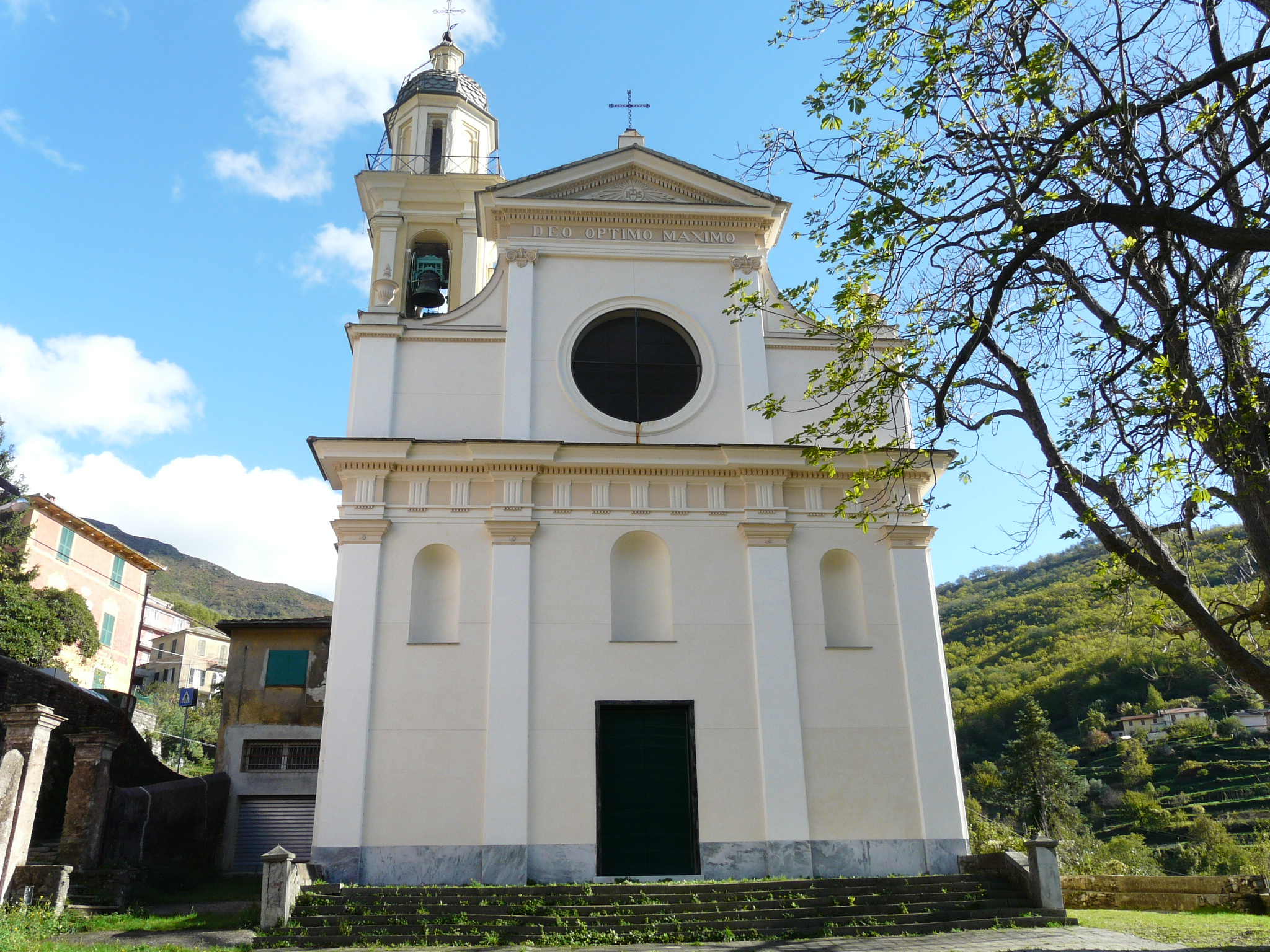 Chiesa di San Maurizio, Neirone, Liguria, Italia